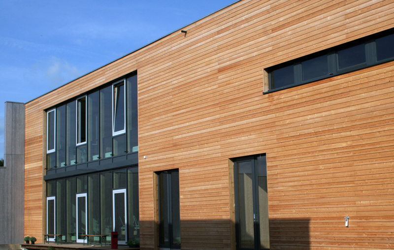 Campus II an der Bonn-Brühler-Straße